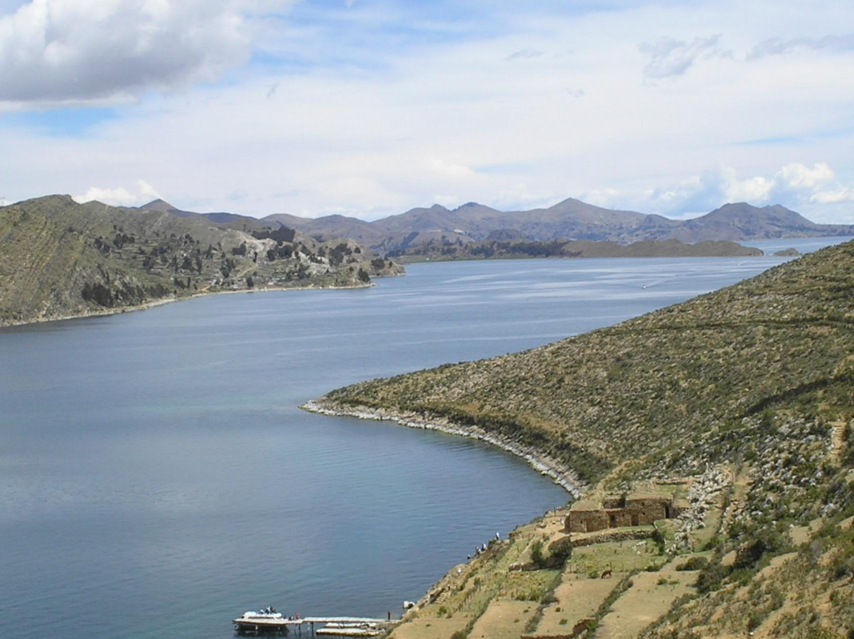 Elas começam enquanto subimos a trilha e não páram mais...